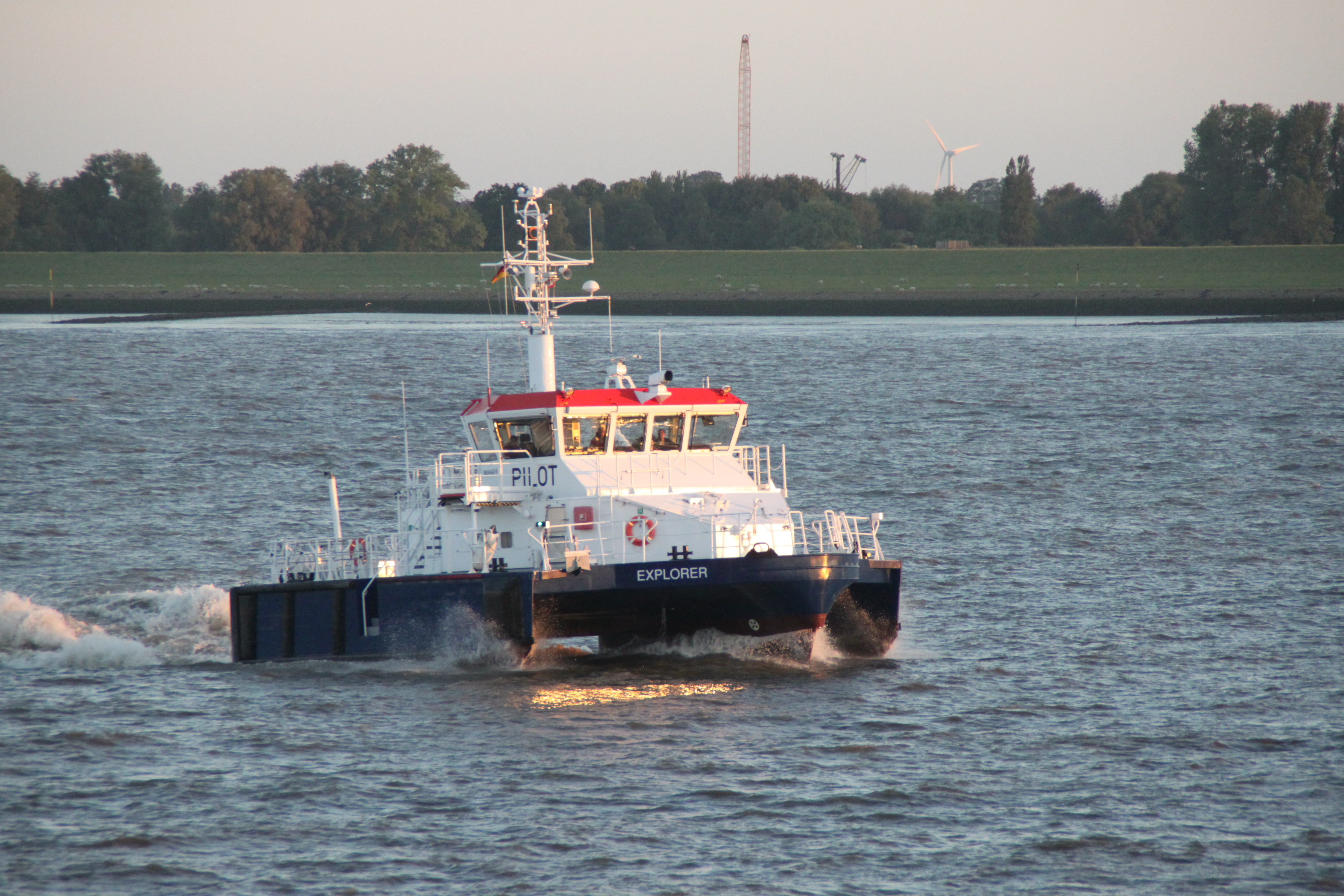 EXPLORER SWASH-Pilot-Boat in Brunsbüttel